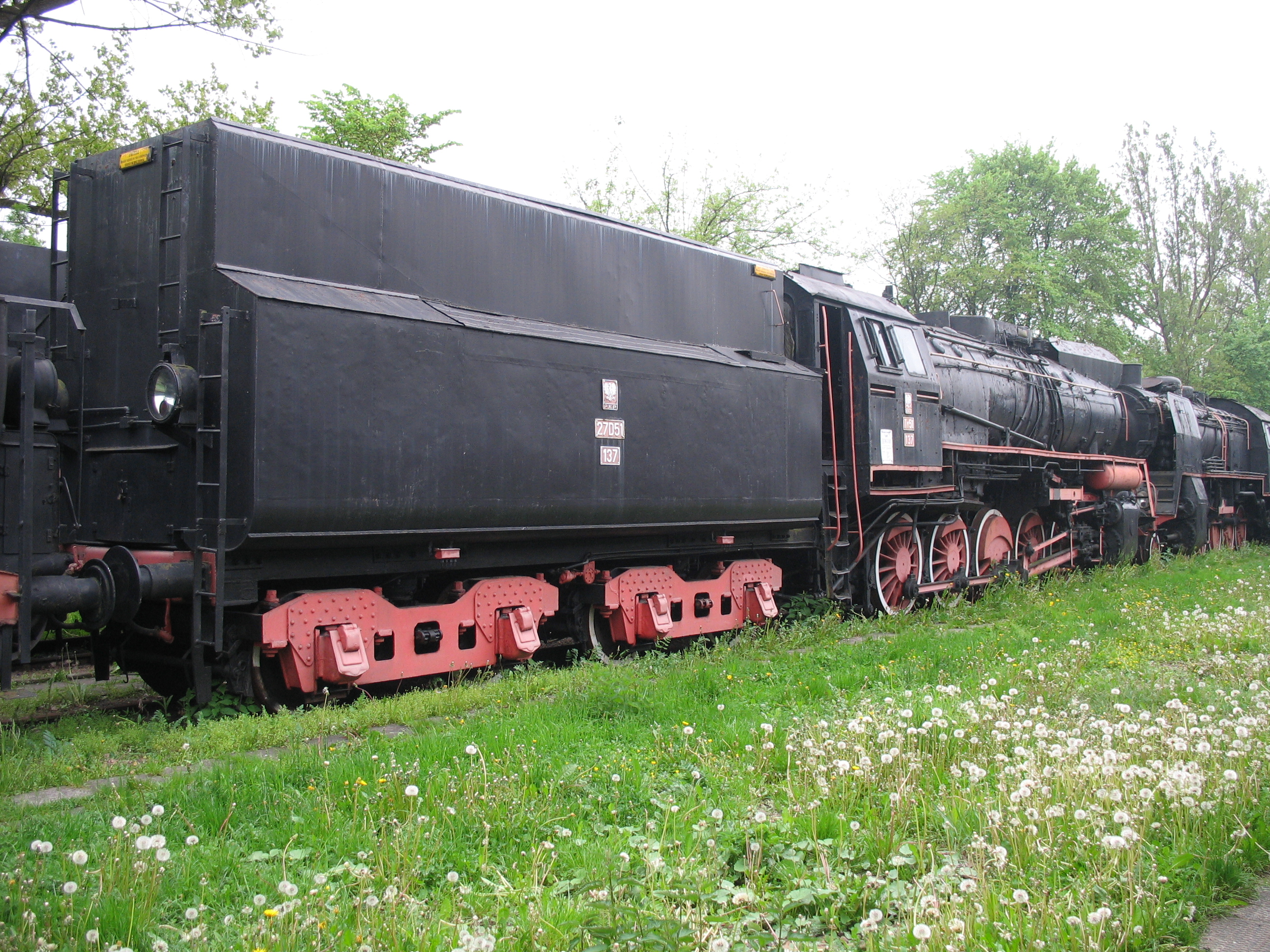 Lokomotywa parowa Ty51-137. Eksponat skansenu taboru kolejowego w Chabówce